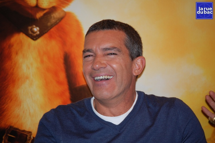 Antonio Banderas pendant la conférence de presse du Chat Potté à Paris